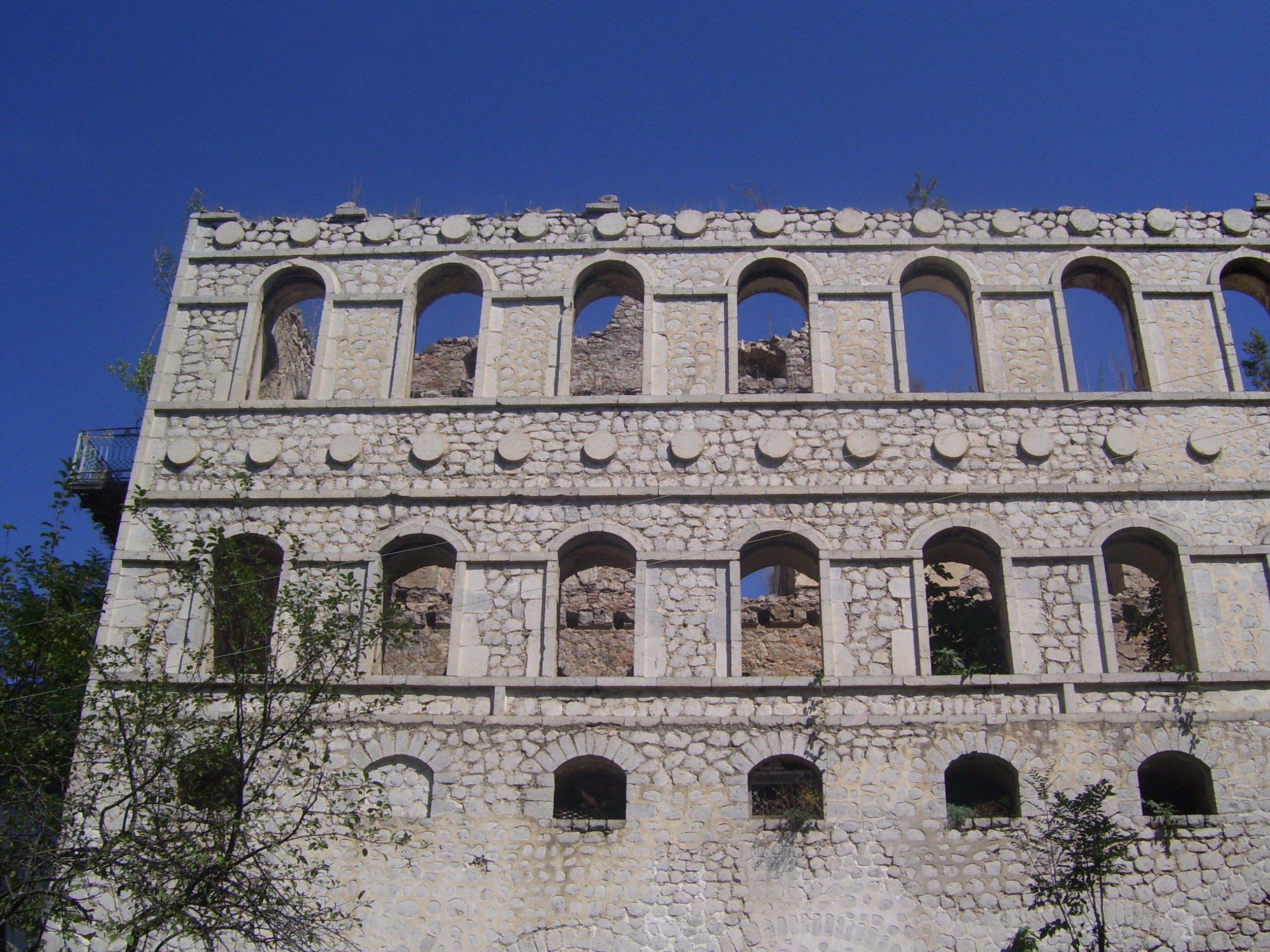 Şuşa şəhərində Azərbaycan şairəsi Xurşidbanu Natəvanın evi